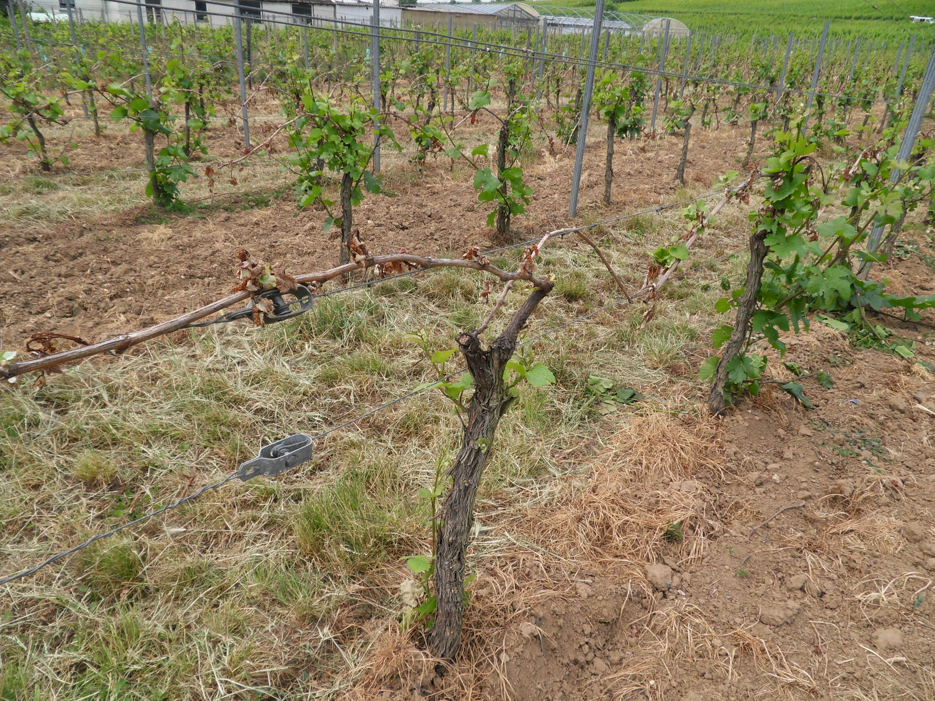 Zustand von Weinreben einen Monat nach den Nachtfrösten vom 4. Mai 2011 im Erbacher Steinmorgen. Zu sehen ist, dass die ursprünglichen Austriebe an dem zweijährigen Holz der beiden Bogreben mit den Blütenständen erfroren und vertrocknet sind. An der relativ schwachen Neuentwicklung von Laub verglichen mit benachbarten Rebstöcken zeigt sich eine schwache Vitalität des Rebstocks. Wegen der geringen Menge an Weinlaub ist gut die Erziehungsart nach Jules Guyot mit dem Drahtrahmenspalier zu erkennen. Im Hintergrund ist die Grenze der frostgeschädigten Fläche zu sehen. Dahinter im ansteigenden Weinberg hat die Begrünung eine ganz andere Qualität.